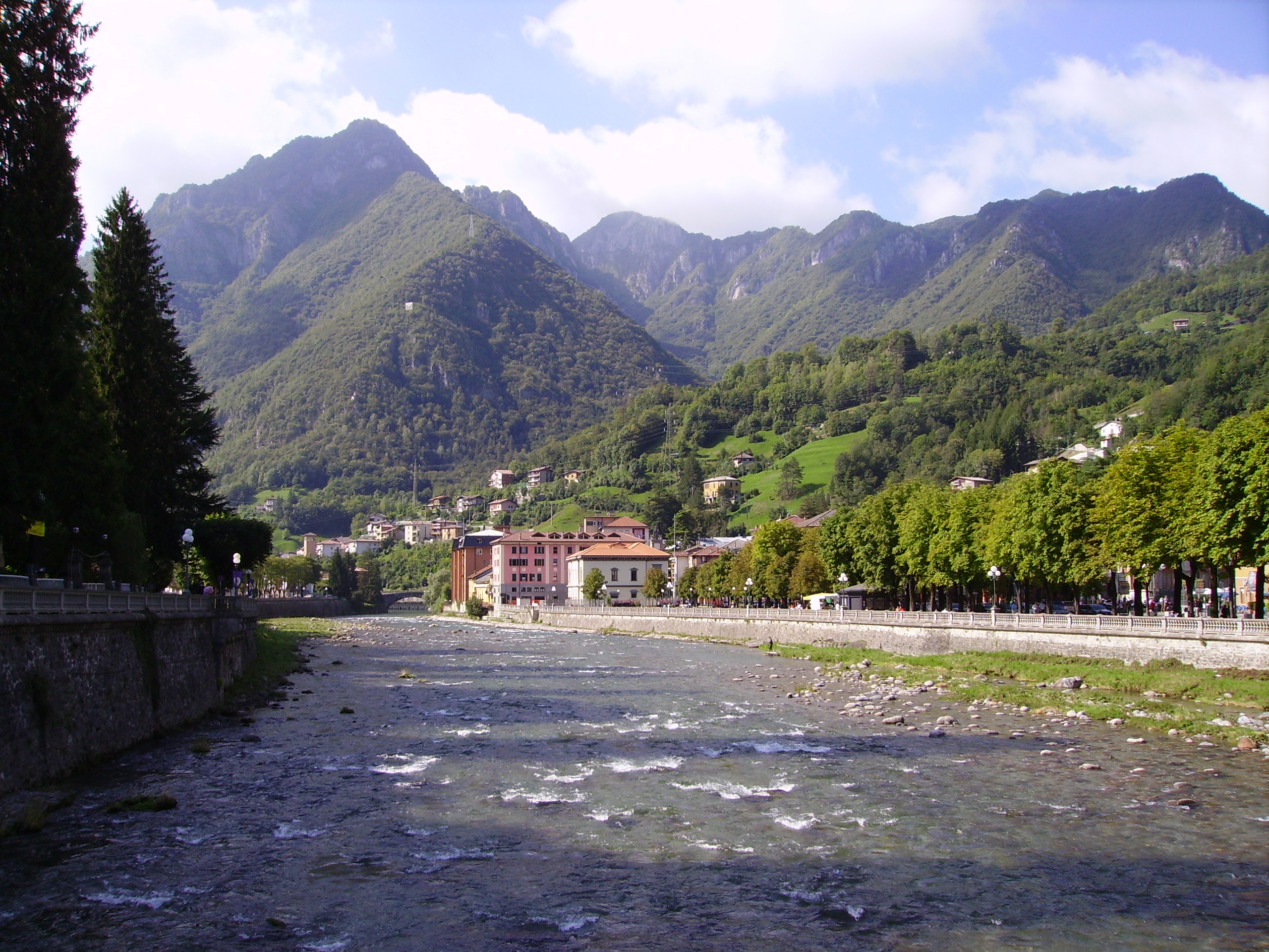 Il Brembo a San Pellegrino Terme